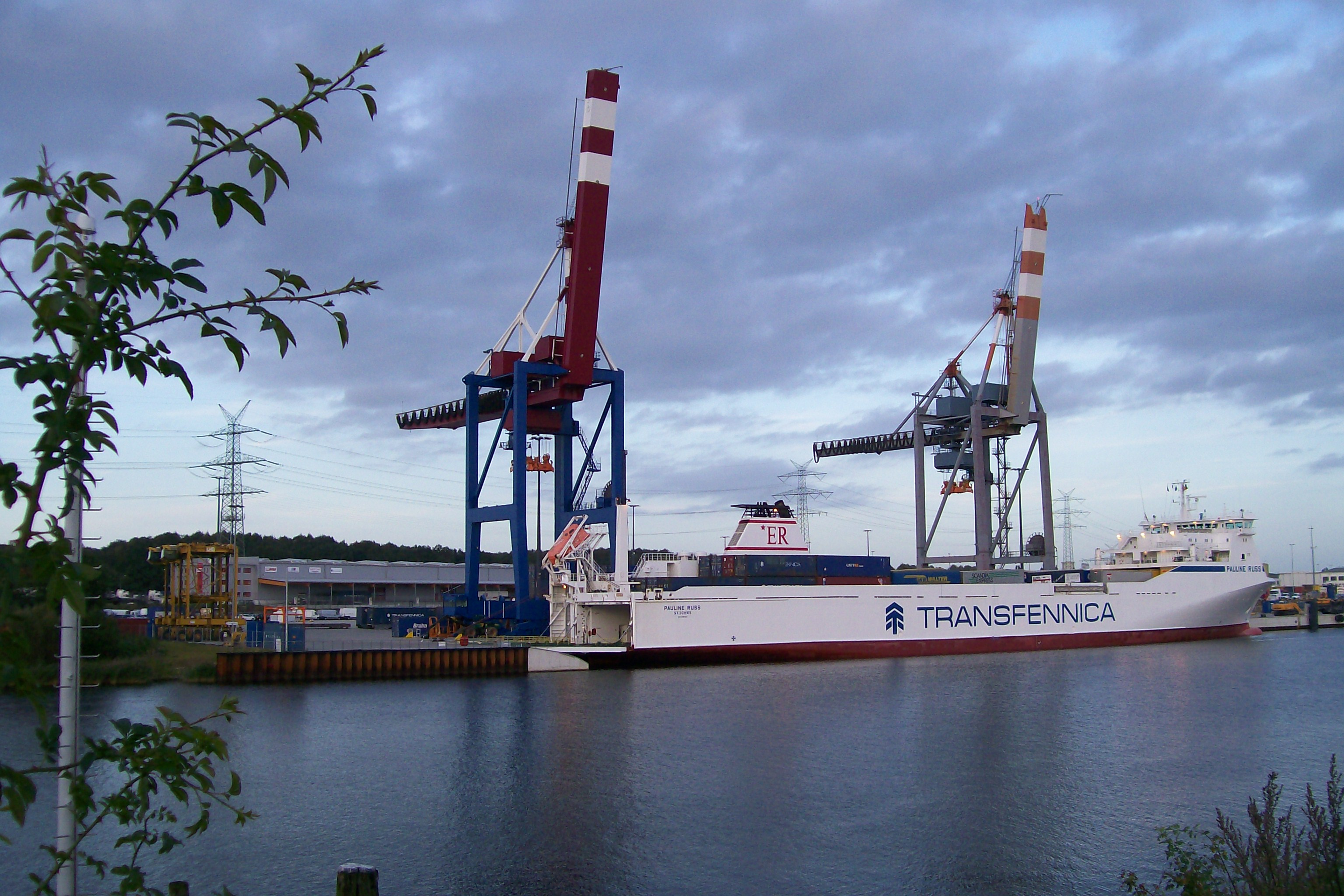 Seelandkai an der Trave in Lübeck-Herrenwyk, von der Herreninsel aus gesehen.